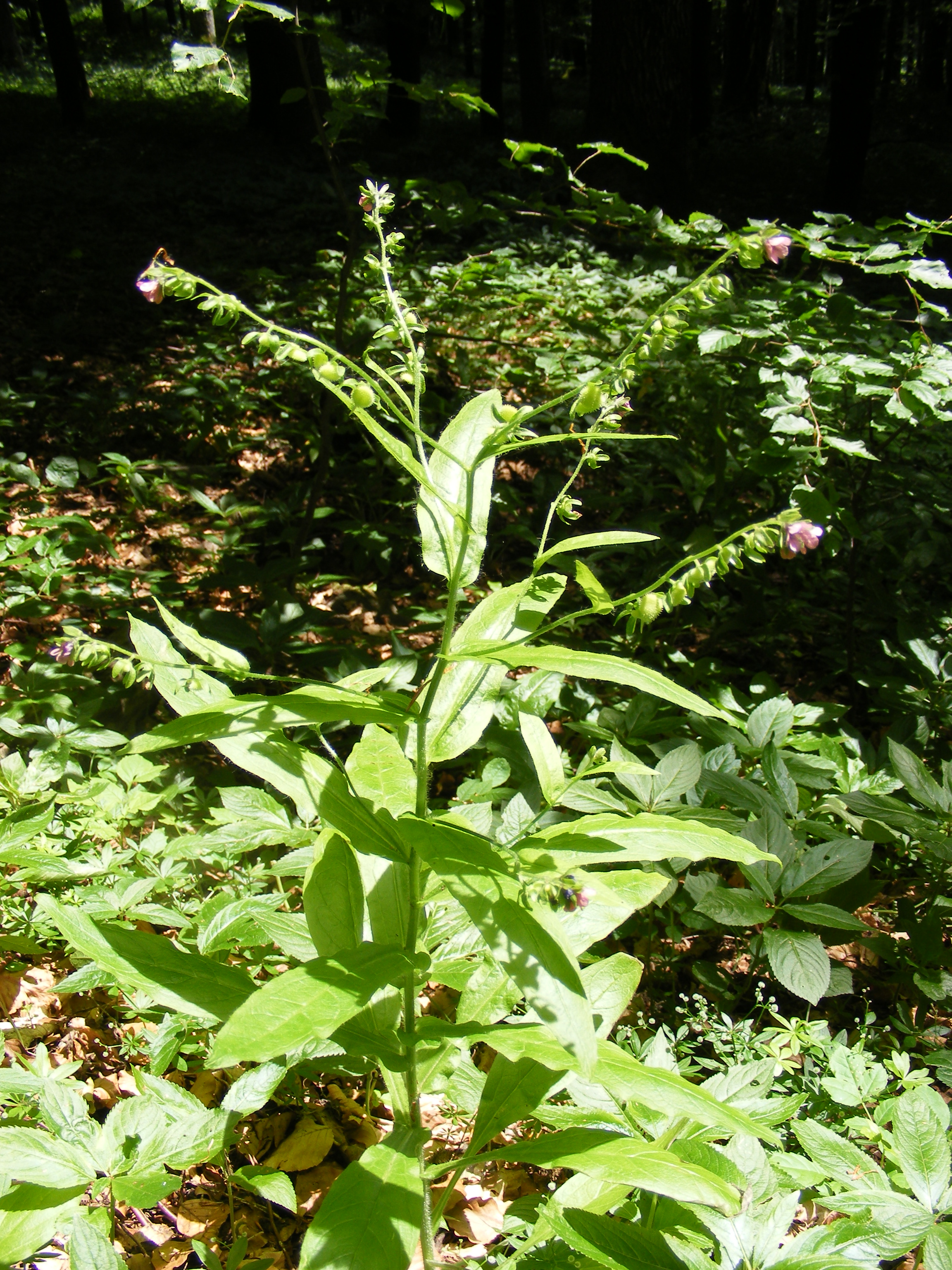 Boshondstong